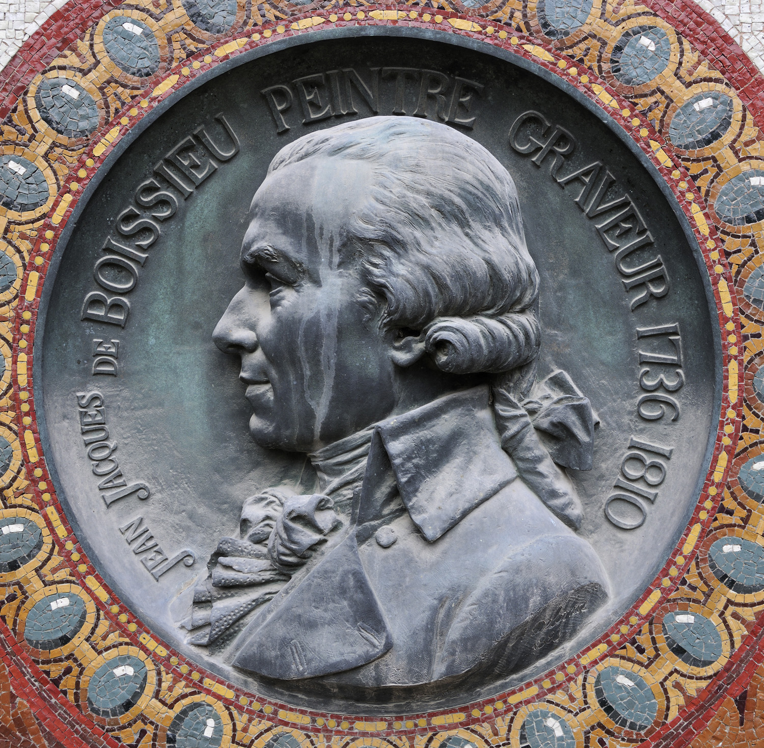 Médaillon de bronze à l'effigie de Jean-Jacques de Boissieu, réalisé par Jean-André Delorme (1829-1905)